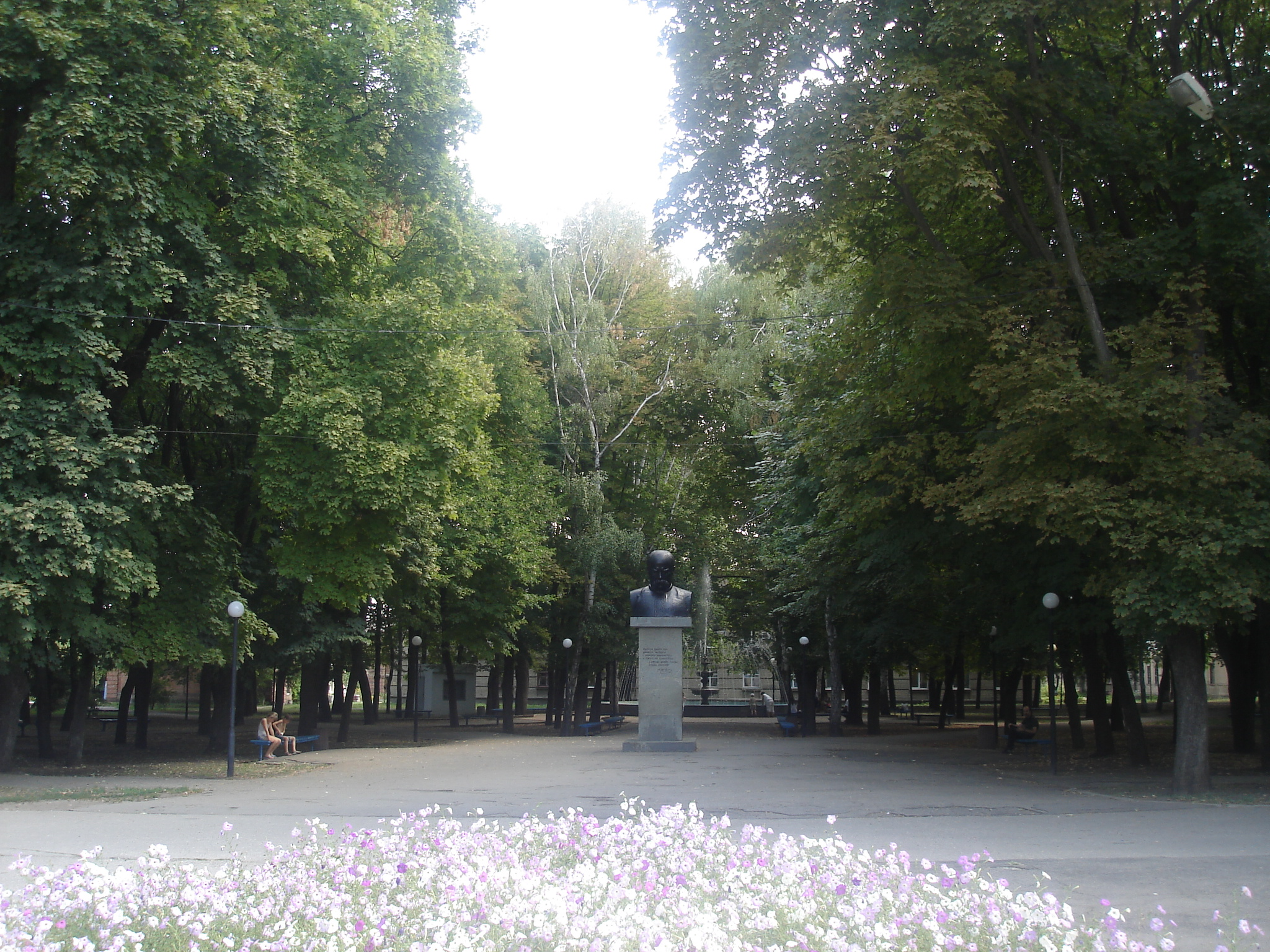 Сквер імені Т. Г. Шевченка у місті Лозова